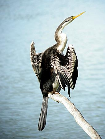 Darter, origine File:Darter-341.jpg photo prise par User:Tannin